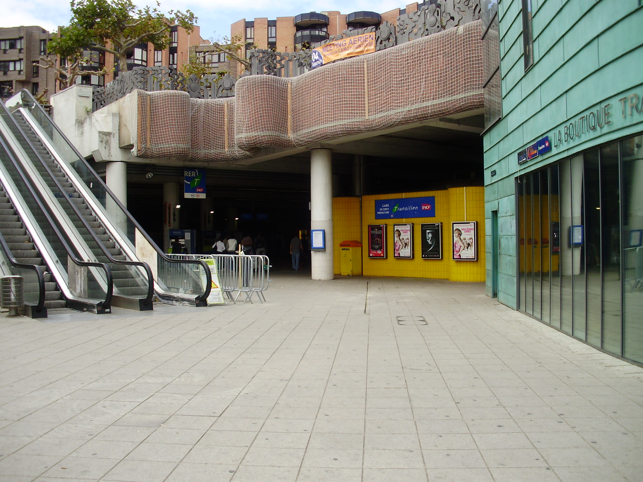 Gare de Cergy-Préfecture, à Cergy, Val-d'Oise, France : entrée de la gare